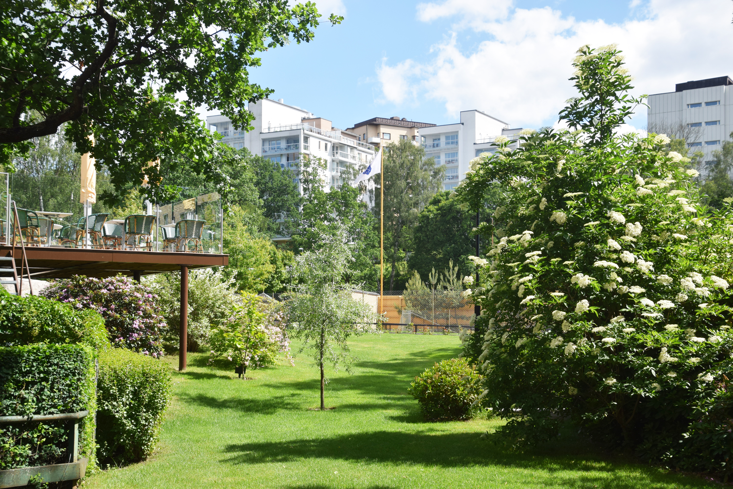 Utsikt över tennisparken